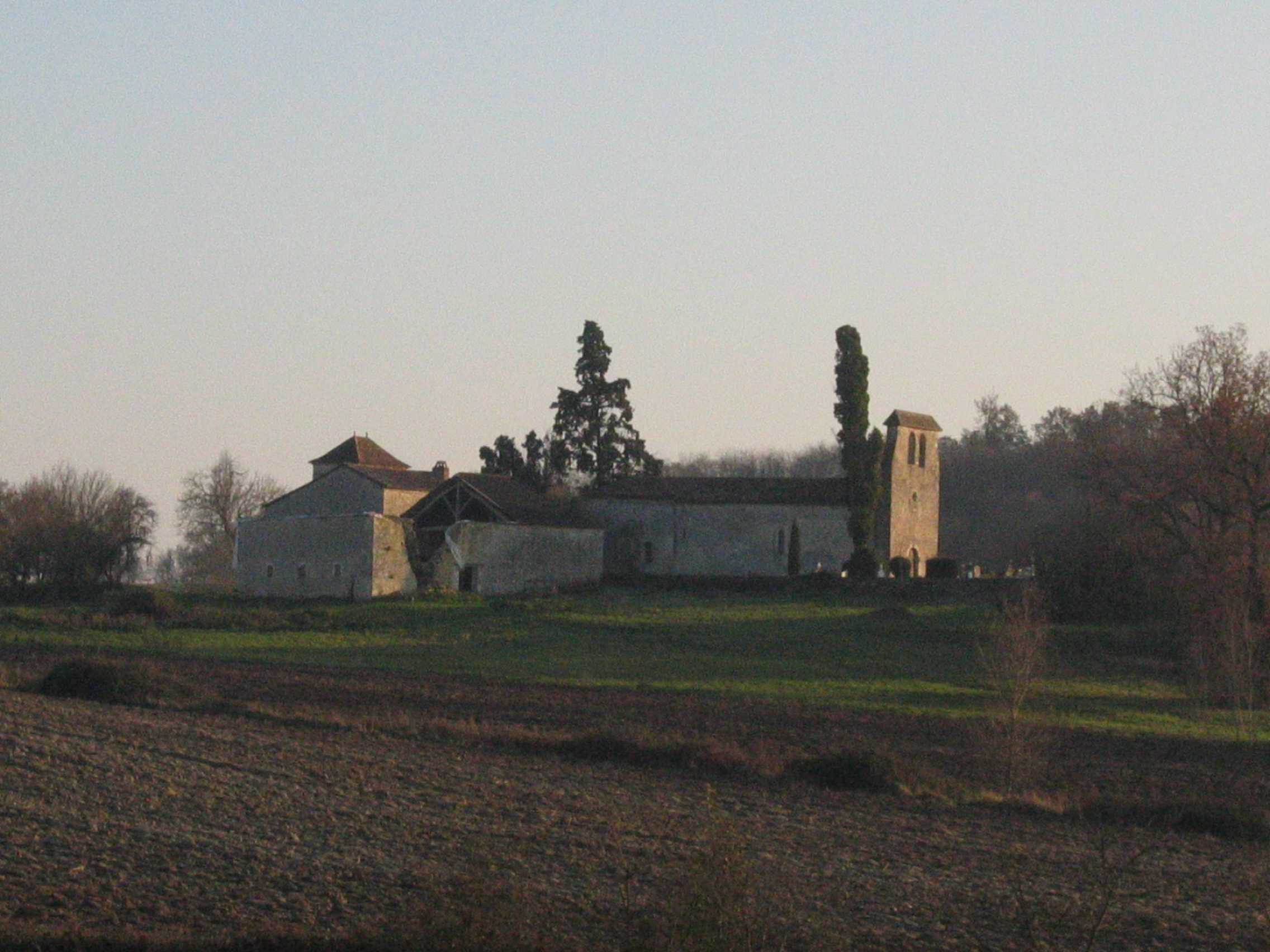 Église du prieuré de Monbos, Thénac, Dordogne, France Object location44° 44′ 37.1″ N, 0° 23′ 11.2″ E